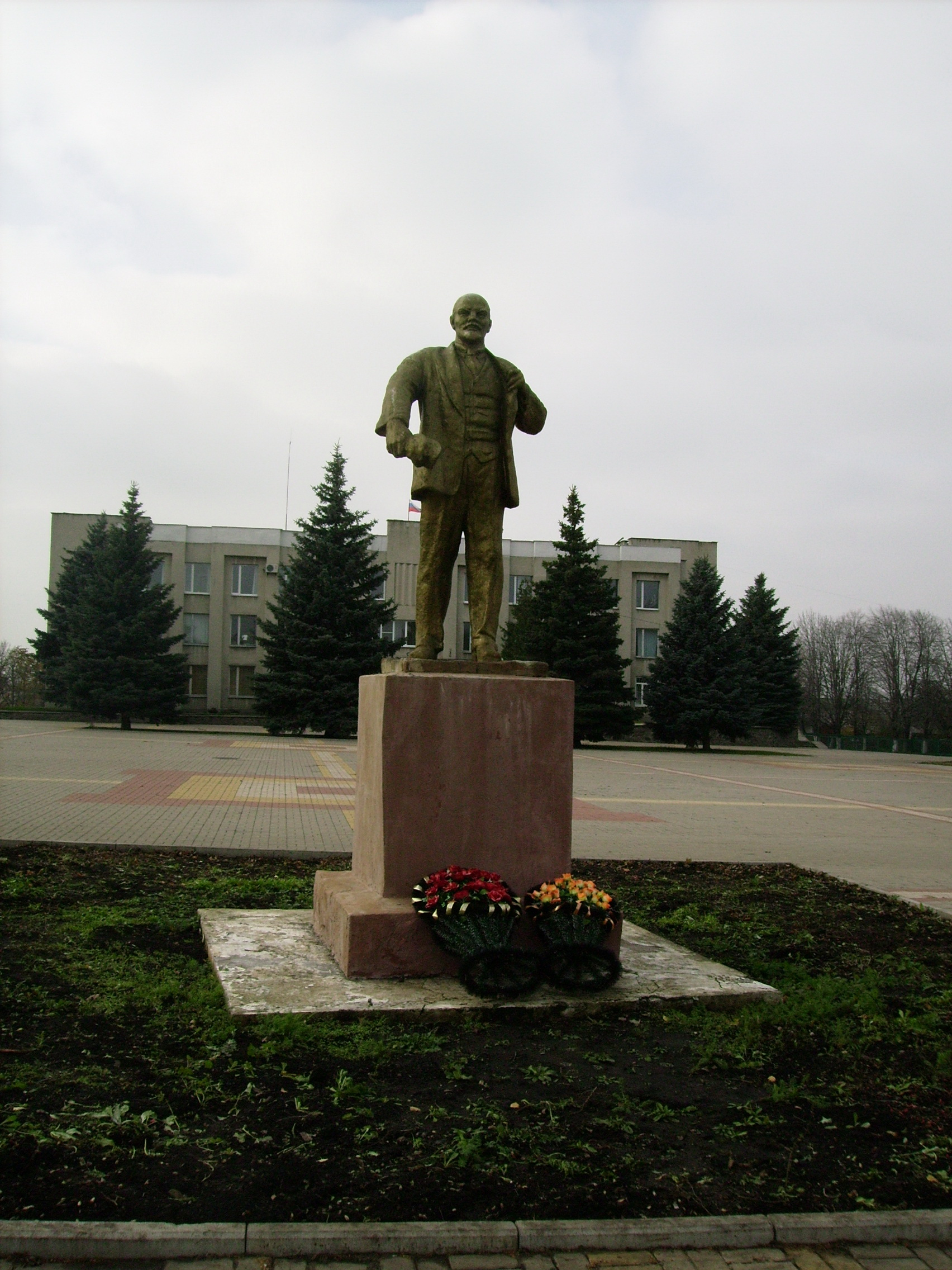 Скультура В.И. Ленина.